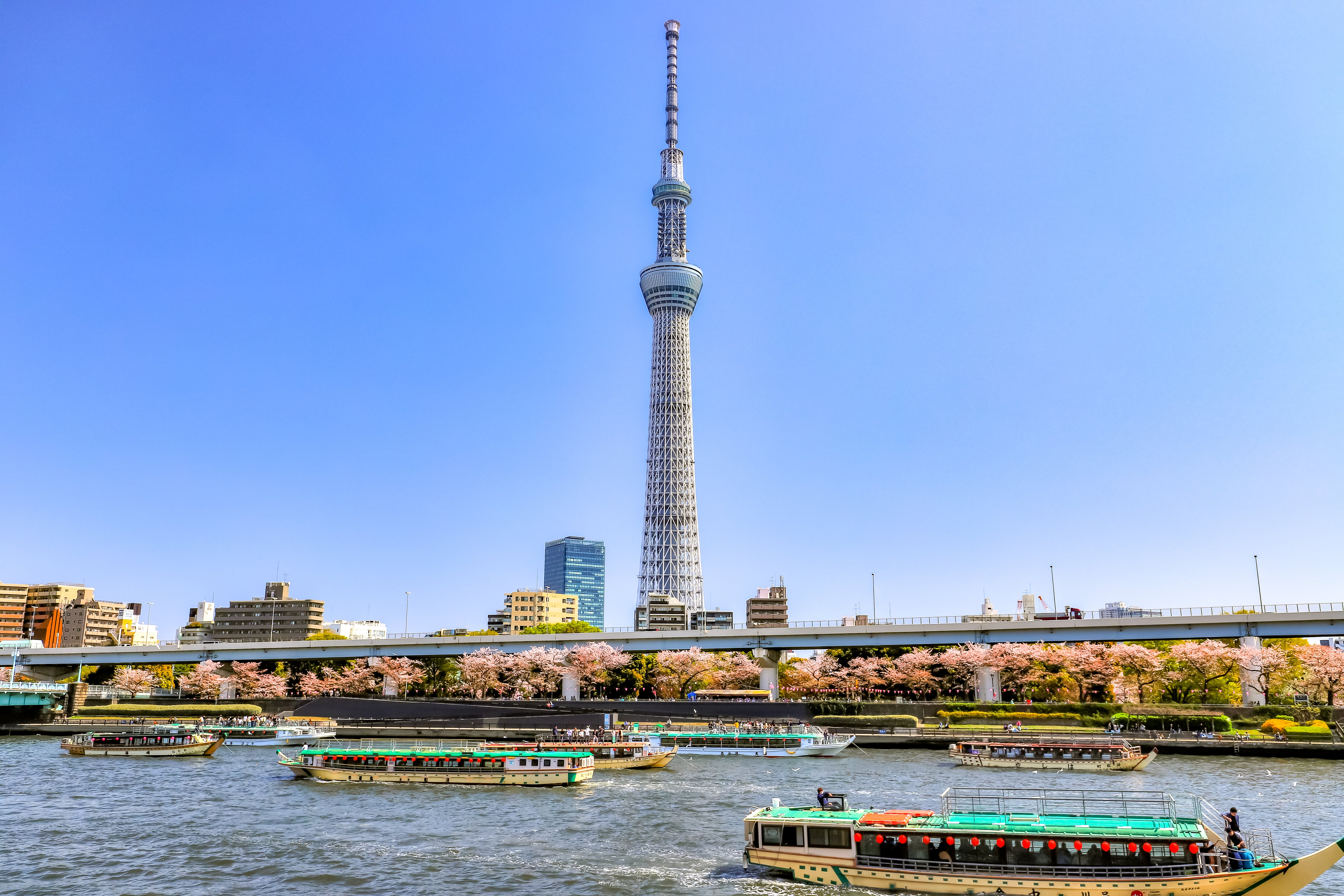 東京都台東区、東京スカイツリー、桜、隅田公園右岸